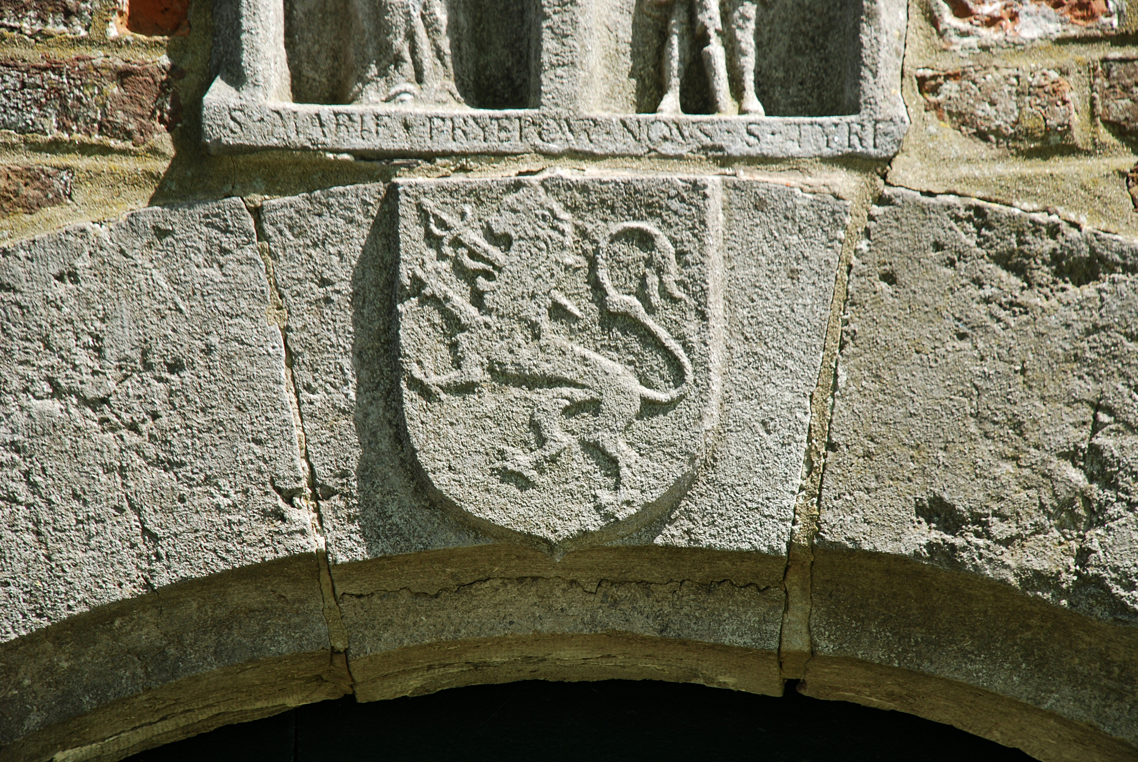 Belgique - Bousval - Chapelle du Try-au-Chêne